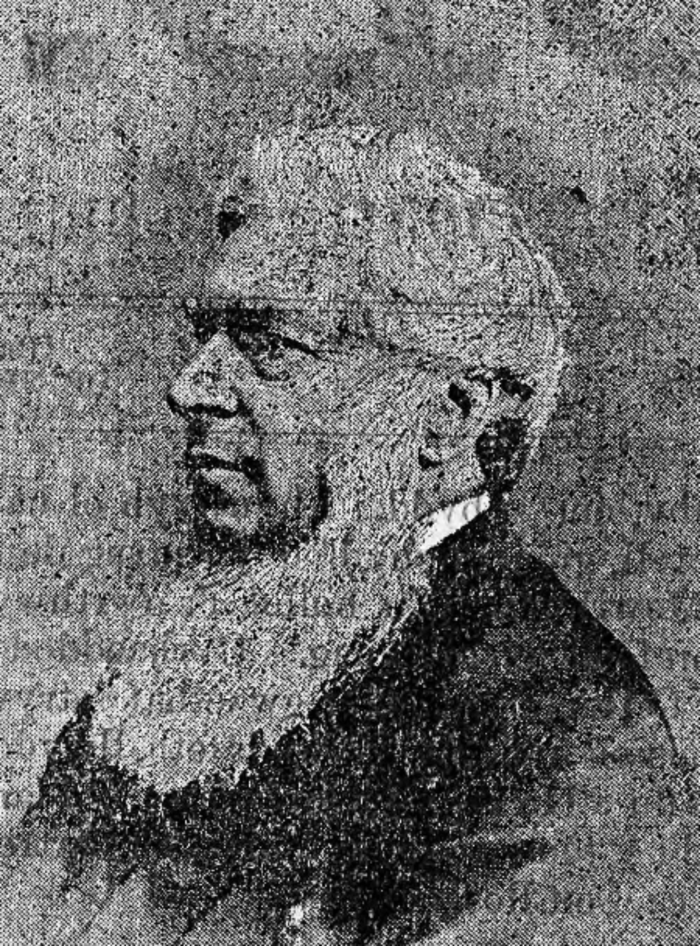 Henry Robertson